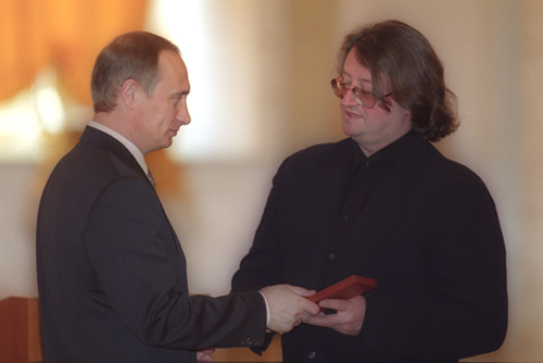 МОСКВА, КРЕМЛЬ. Вручение государственных наград. Звание народного артиста Российской Федерации присвоено композитору и певцу Александру Градскому.